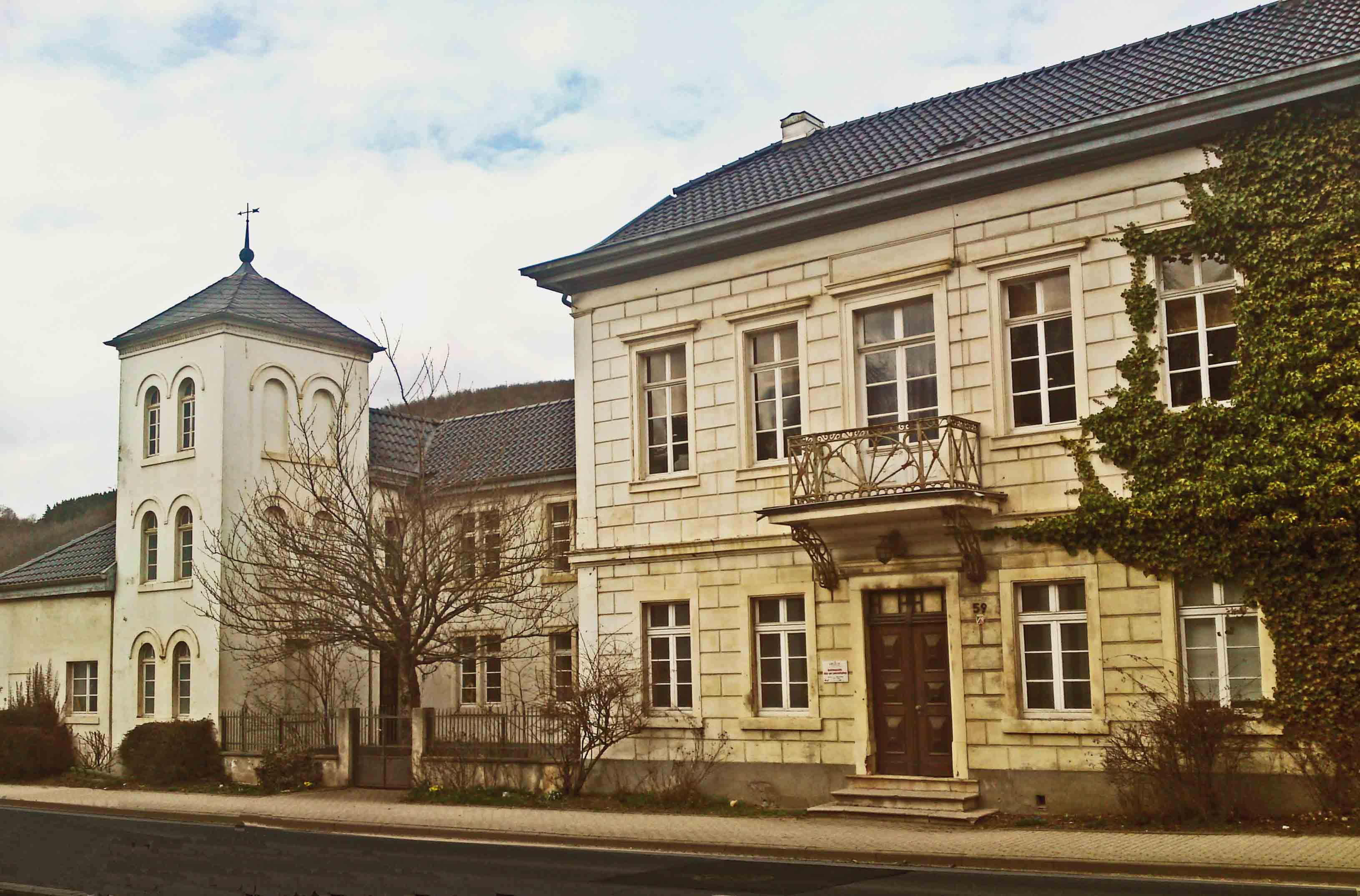 Poensgenhaus im Schleiden-Gemümd, Kölnerstrasse 57-59